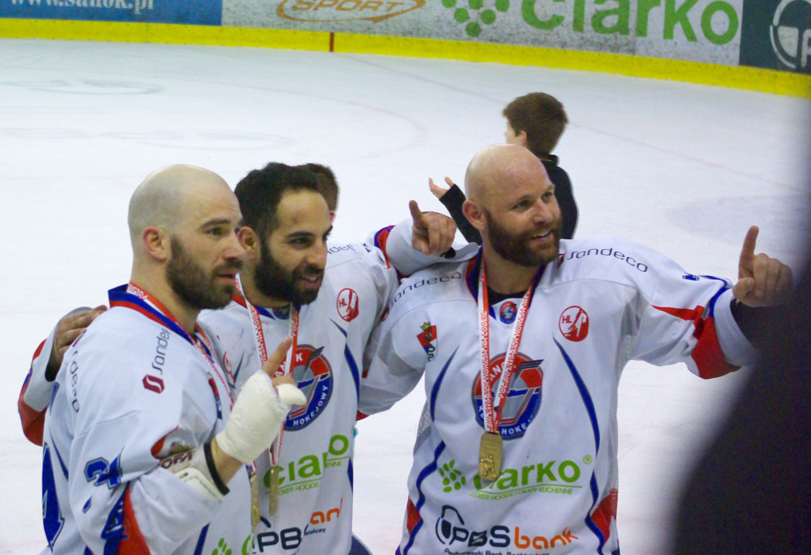 Szósty mecz finałowy o mistrzostwo Polski w hokeju na lodzie w sezonie PHL 2013/2014: Ciarko PBS Bank KH Sanok – GKS Tychy (2:0), 3 kwietnia 2014 w Sanoku (Arena Sanok). Mike Danton, Samson Mahbod, Mike Bayrack